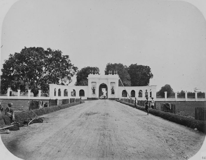 Amsterdamsche poort (Gerbang Amsterdam), disebut juga Pinangpoort (Gerbang Pinang) atau Kasteelpoort. Bangunan ini adalah sisa peninggalan benteng VOC semasa J.P. Coen dan berada di sisi utara. Ketika benteng itu dibongkar pada masa Daendels, gerbang ini dipertahankan hingga berakhirnya kekuasaan Belanda di Batavia. Sepasang patung yang ada adalah patung Dewa Mars dan Dewi Minerva. Kedua patung ini raib ketika pendudukan Jepang. Selanjutnya, bangunan ini dibongkar oleh Pemerintah Indonesia pada tahun 1950 dengan dalih untuk memperlancar lalu-lintas. Tapak bangunan ini adalah di persimpangan Jalan Cengkeh (Prinsenstraat), Jalan Tongkol (Kasteelweg), dan Jalan Nelayan Timur (Amsterdamschegracht) sekarang. Dalam rencana revitalisasi Kota Tua, replika gerbang ini akan dibuat walaupun tidak diketahui apakah akan berada di tapak yang sama